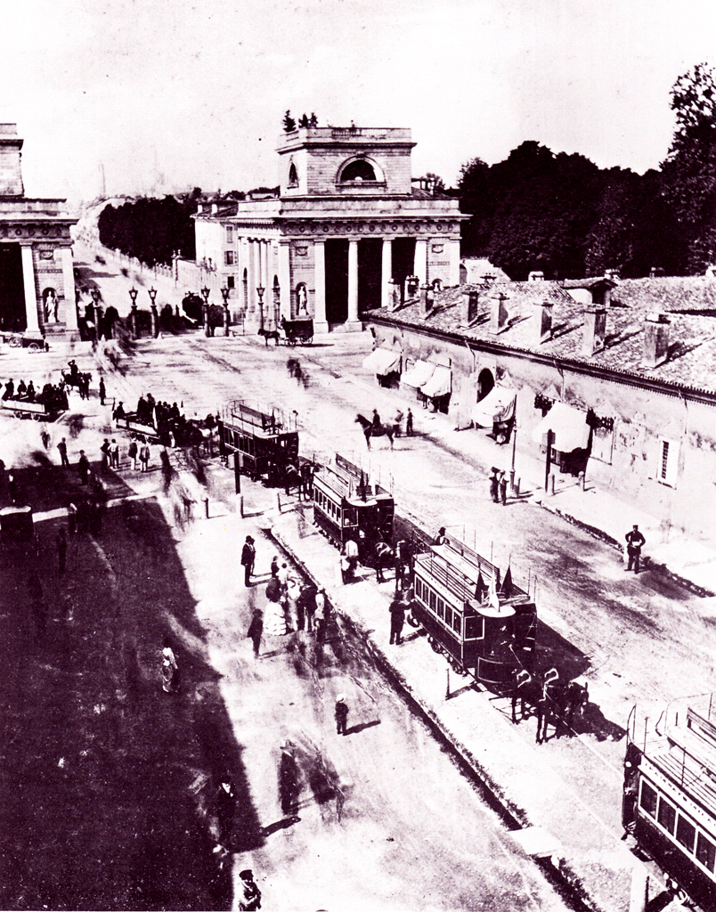 Milano, inaugurazione della tranvia a cavalli per Monza